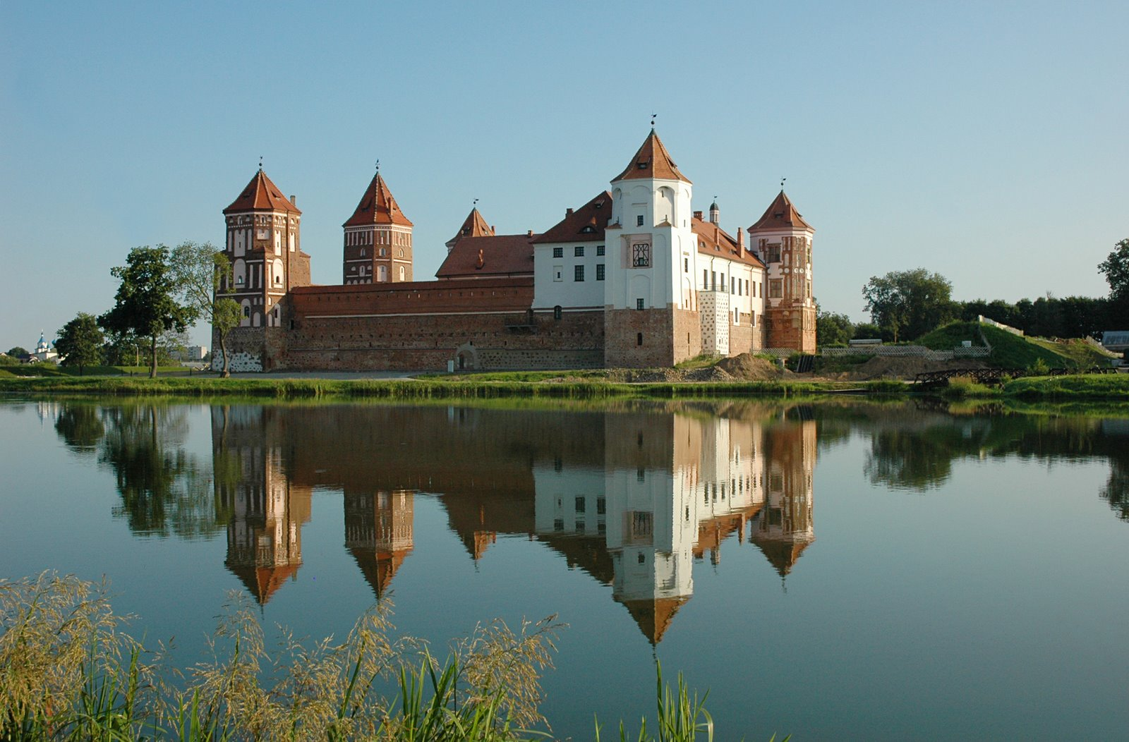 Мирский замок